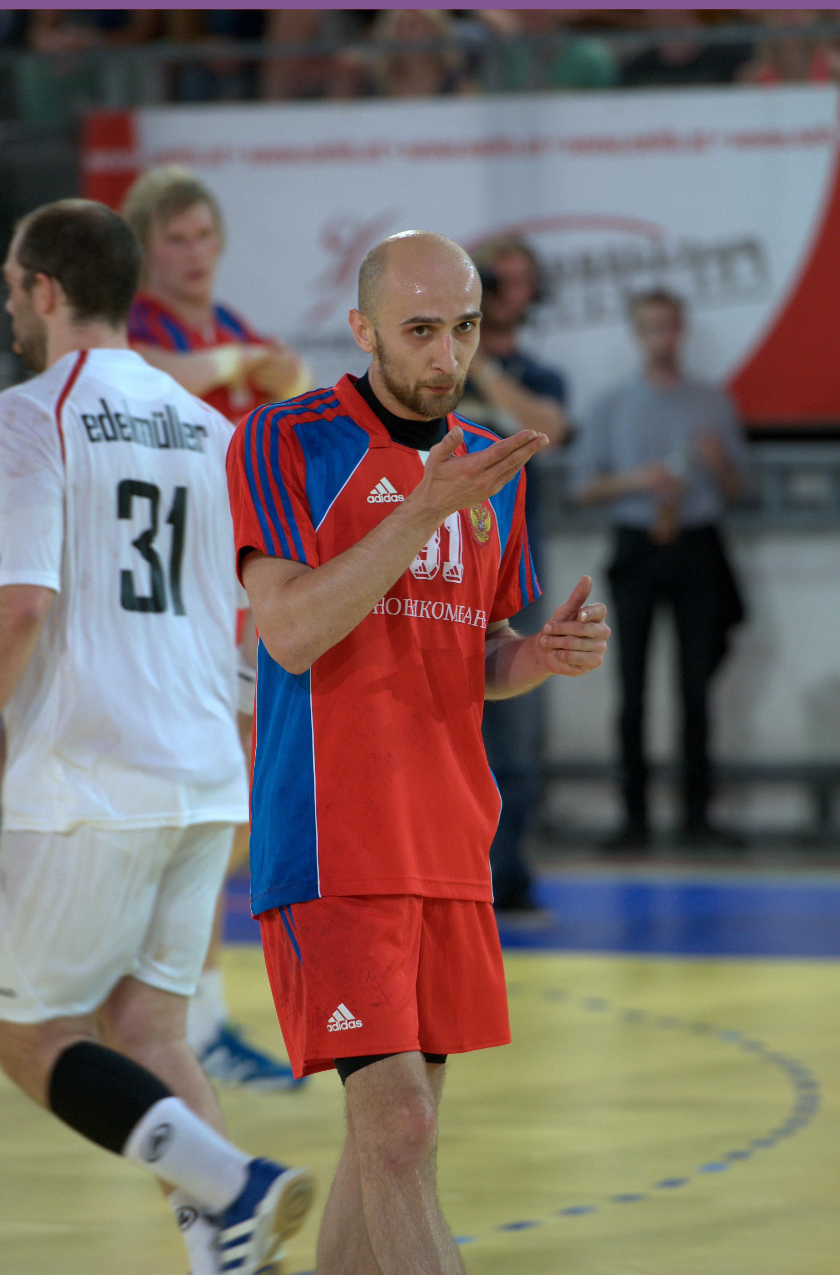 Handball EM Qualifikationspiel Österreich vs. Russland Timur Anatoljewitsch Dibirow